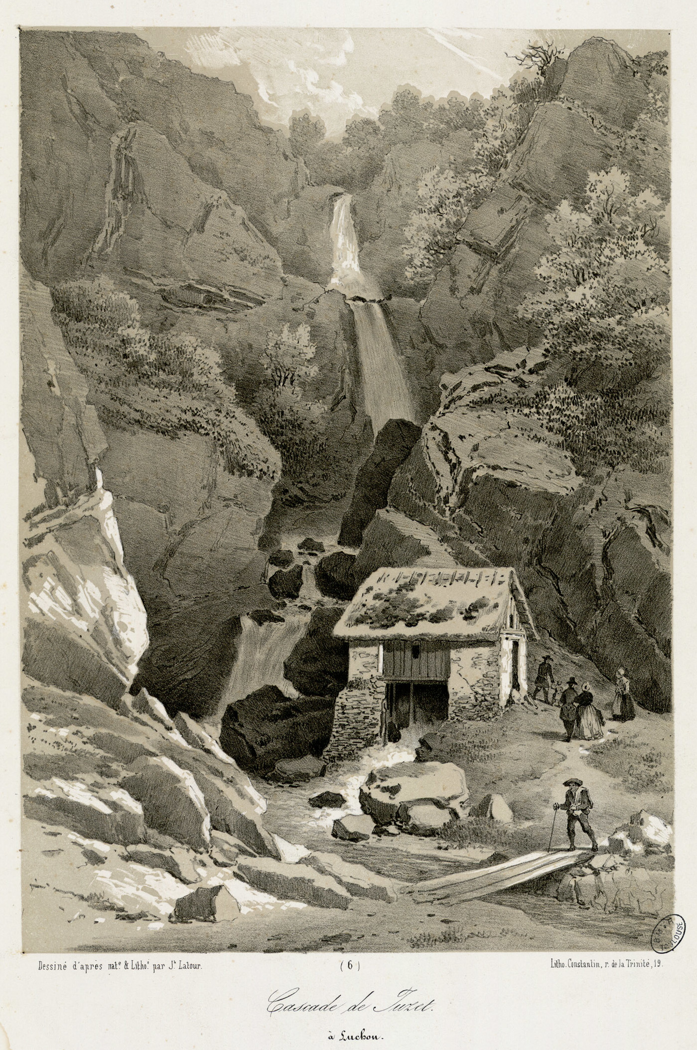 Fait partie d'un recueil de 17 lithographies en camaïeu et 1 pl. en couleurs. Pl. 1 à 12 dessinées et lithographiées par Latour, pl. 13 à 18 dessinées et lithographiées par Eugène Fil. Ancely, René (1876 - 1966). Possesseur